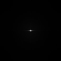 TFF compresion rango